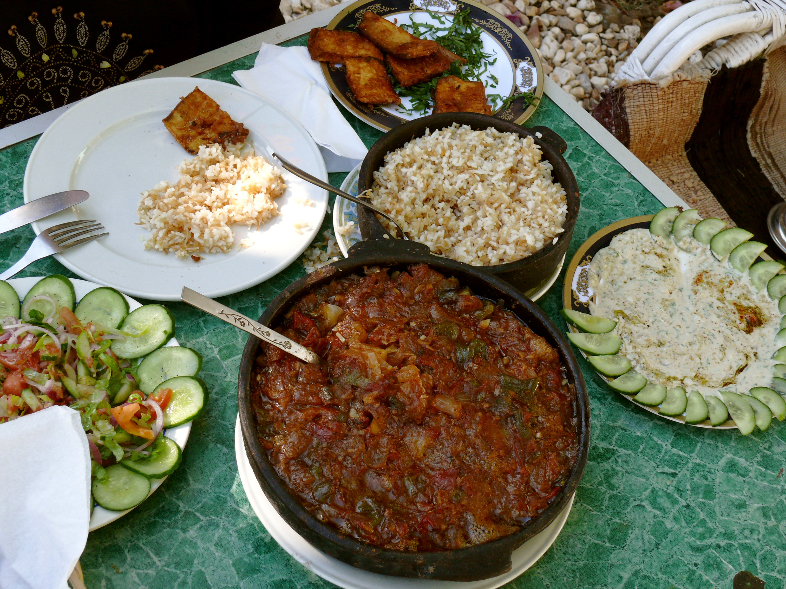 Ägyptische Gerichte